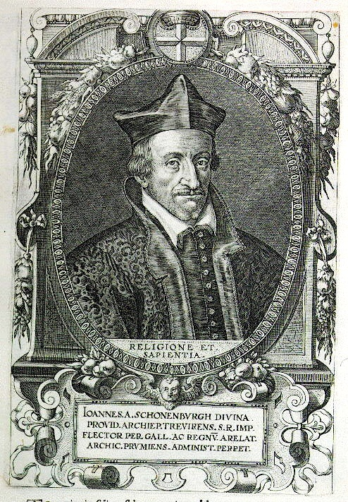 Johann von Schönenberg, Bischof von Trier